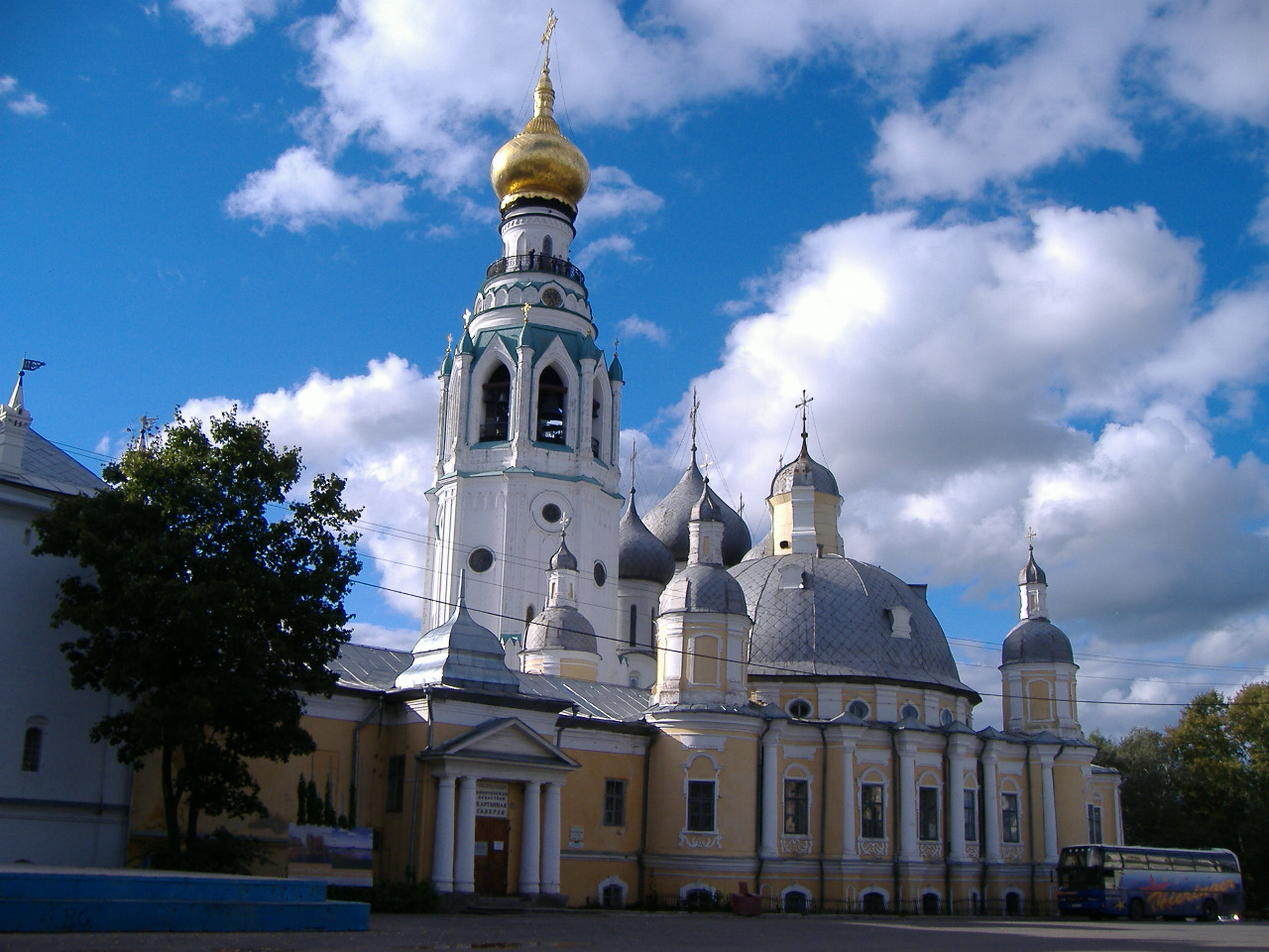 Glockenturm des Kreml der russischen Stradt Wologda